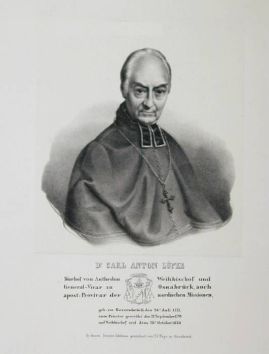 Carl Anton Lüpke (1775-1855). Historische Lithographie aus dem 19. Jh.